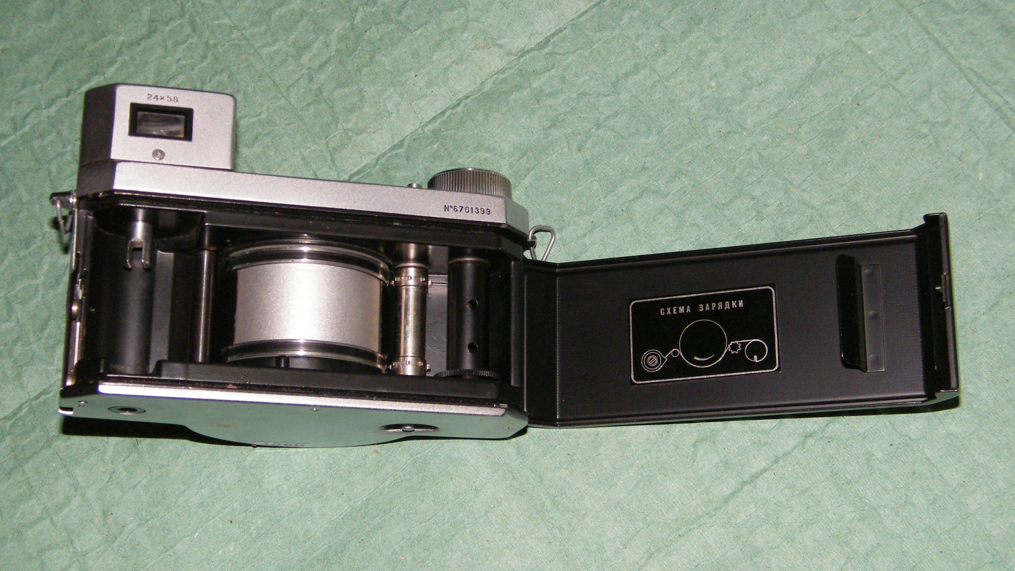 Фотоаппарат Горизонт (КМЗ)